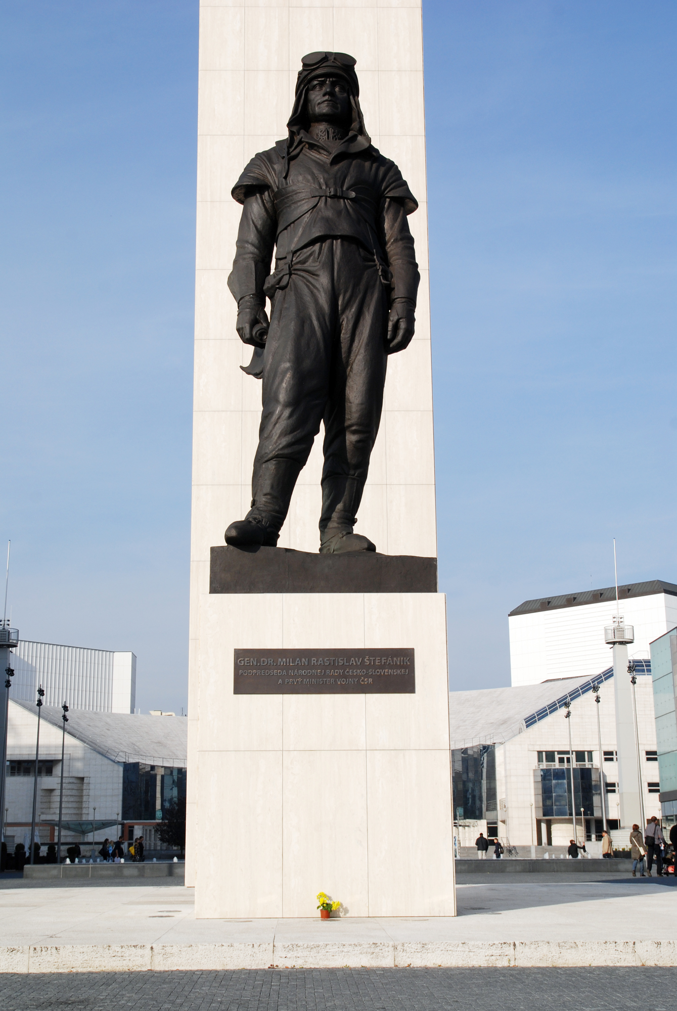 Milan Rastislav Štefánik monument in Bratislava.